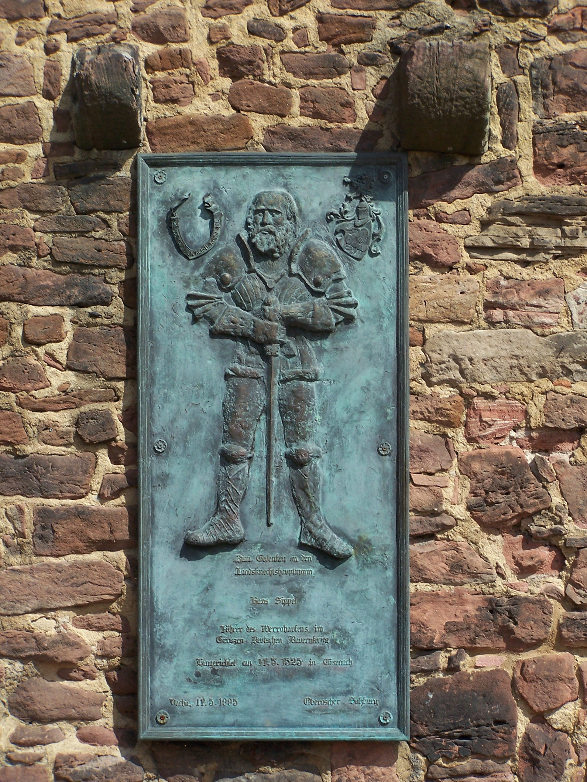 Gedenktafel für den aus Vacha stammenden Hans Sippel, er wurde 1525 in Eisenach exekutiert. Sippel war Hauptmann einer Landsknechtsrotte und wurde zum Anführer des Werrahaufens im Deutschen Bauernkrieg gewählt. Die Tafel am Tor des Burgmuseums der Vachaer Stadtburg Wendelstein wurde 1885 eingeweiht.